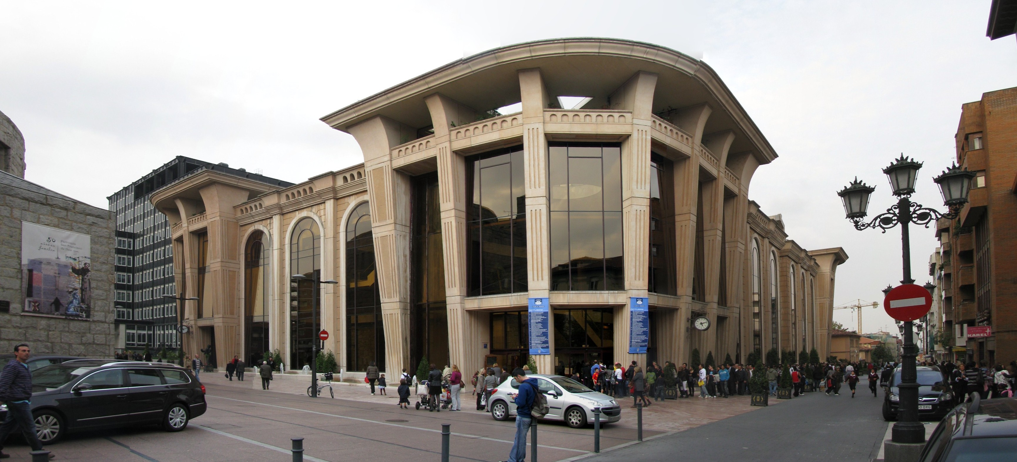 Auditorio Principe Felipe - Oviedo